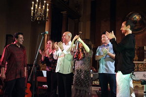 Berakah Project